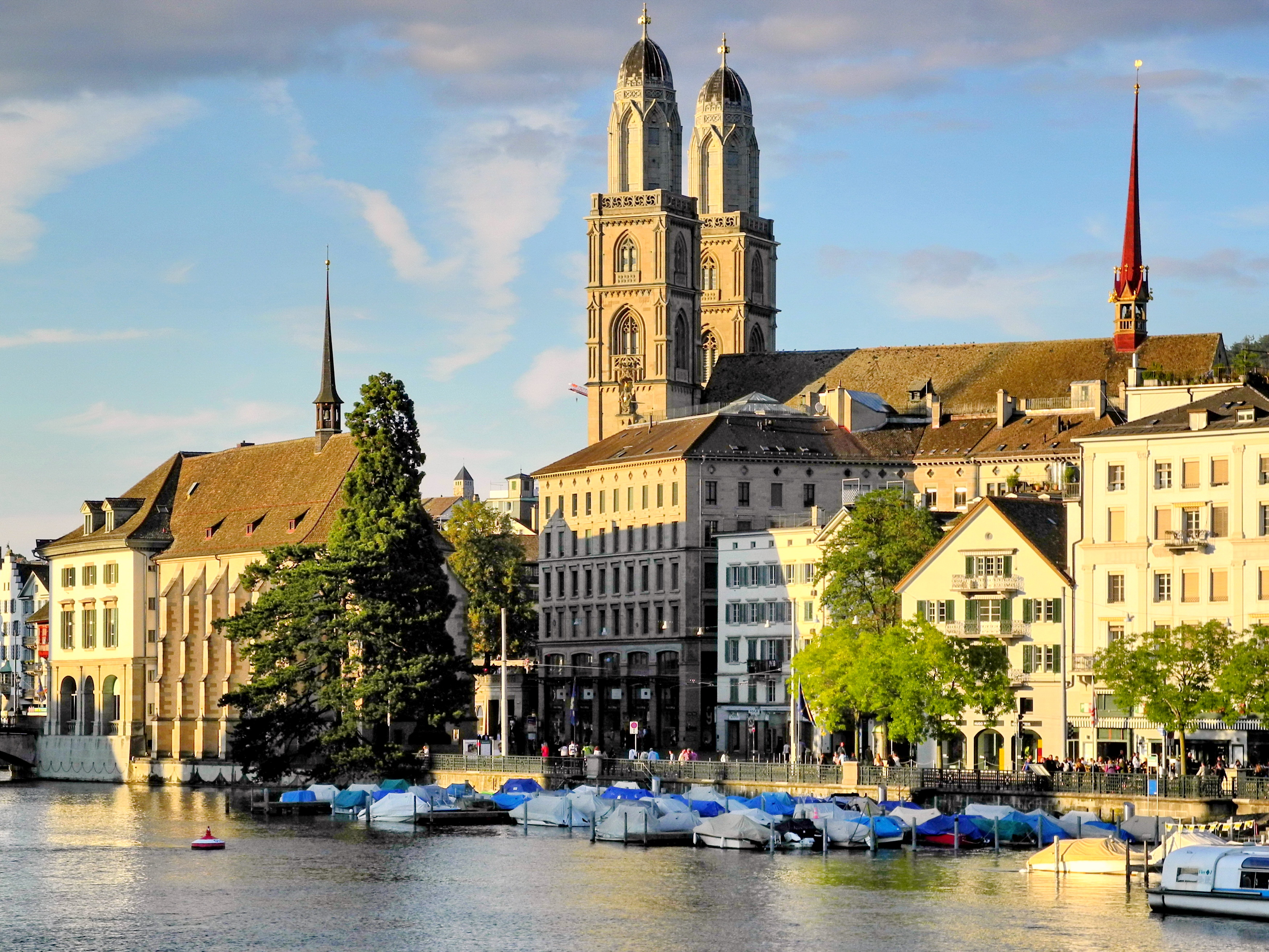 Reformiertes Grossmünster mit Kreuzgang